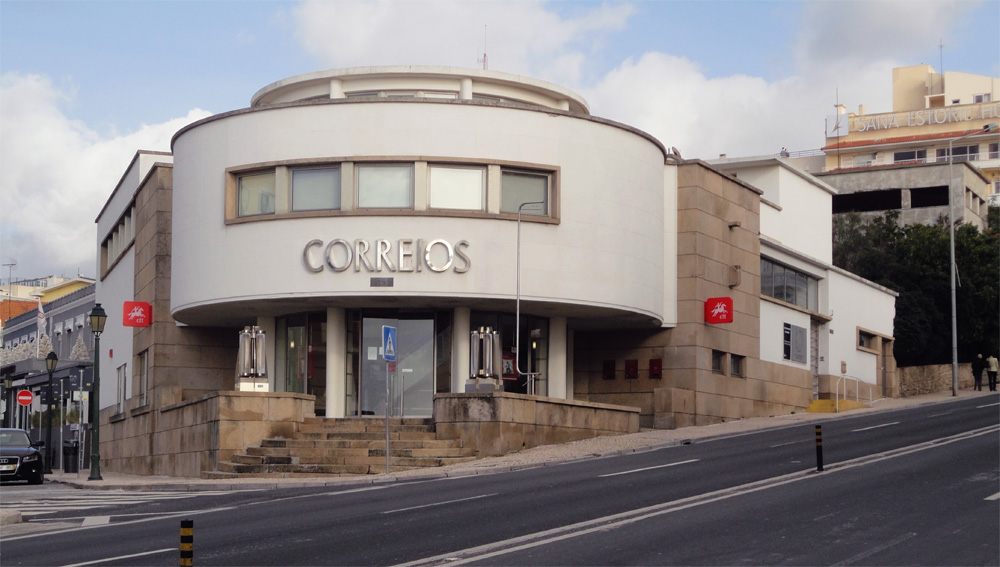 Correios do Estoril; Arq. Adelino Nunes